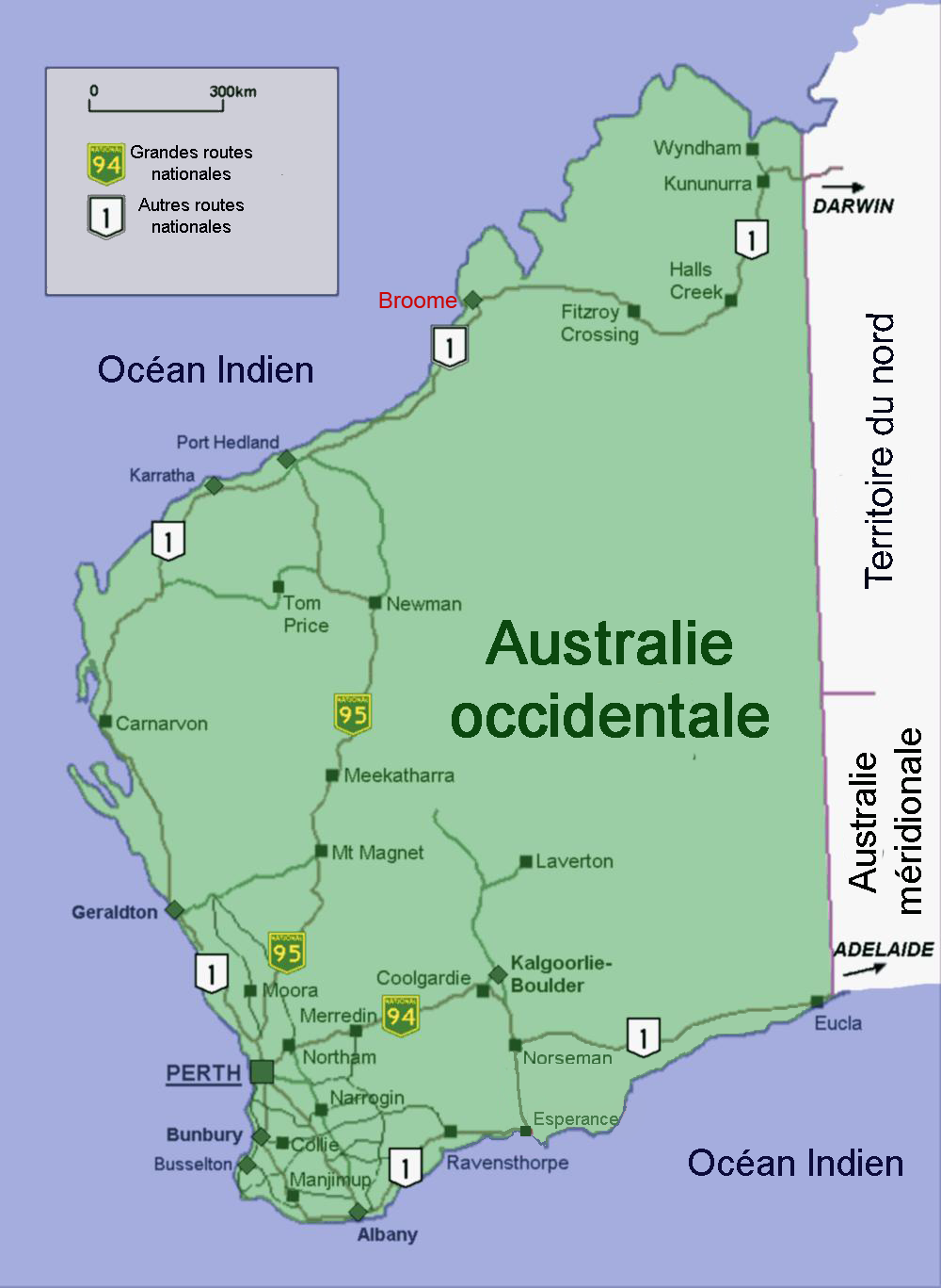 Broome, Australie occidentale, Australie, Carte